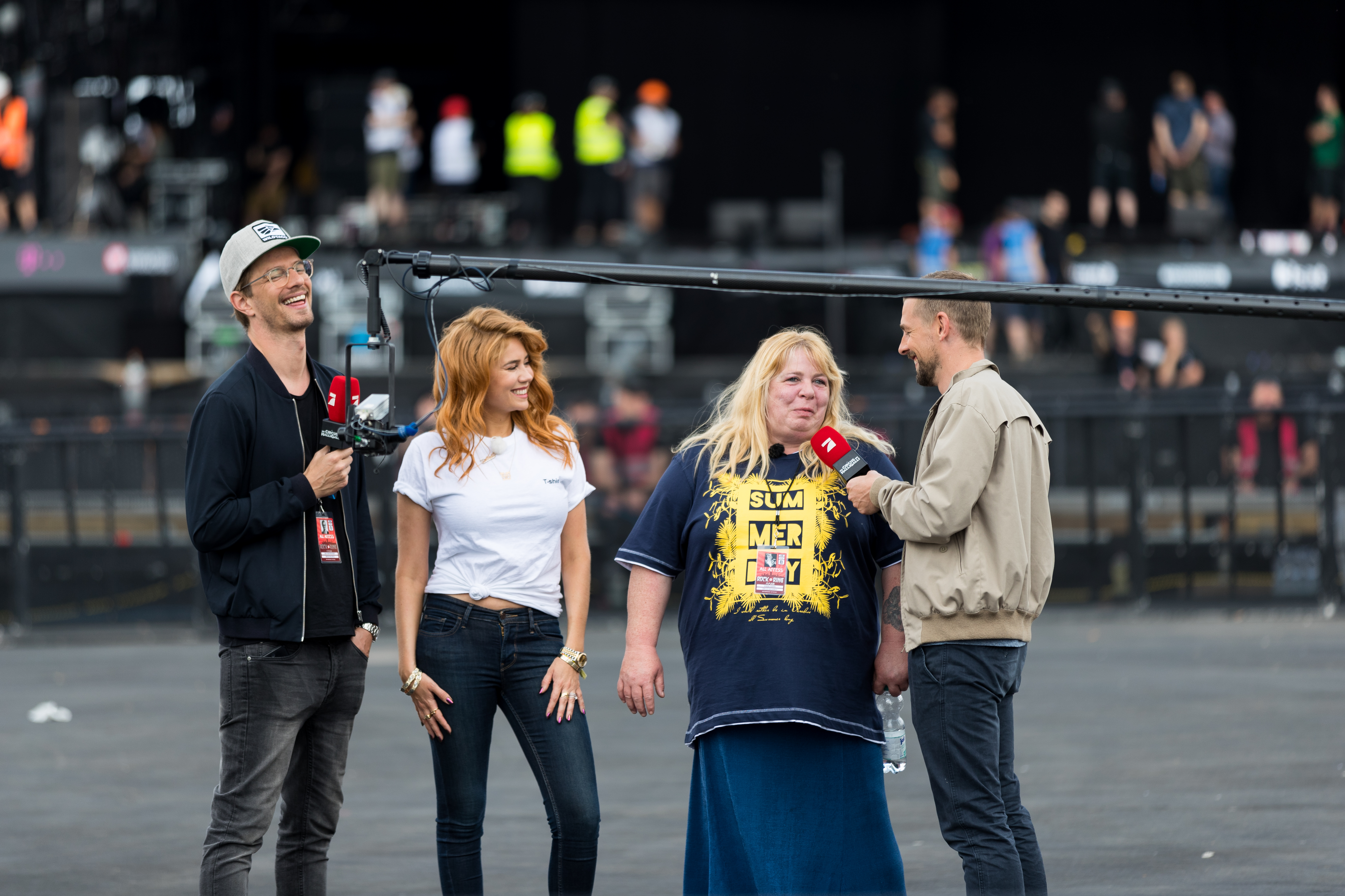 Joko und Klaas during Rock am Ring at Nürburgring, Nürburg, Rheinland Pfalz, Germany on 2017-06-03, Photo: Sven Mandel